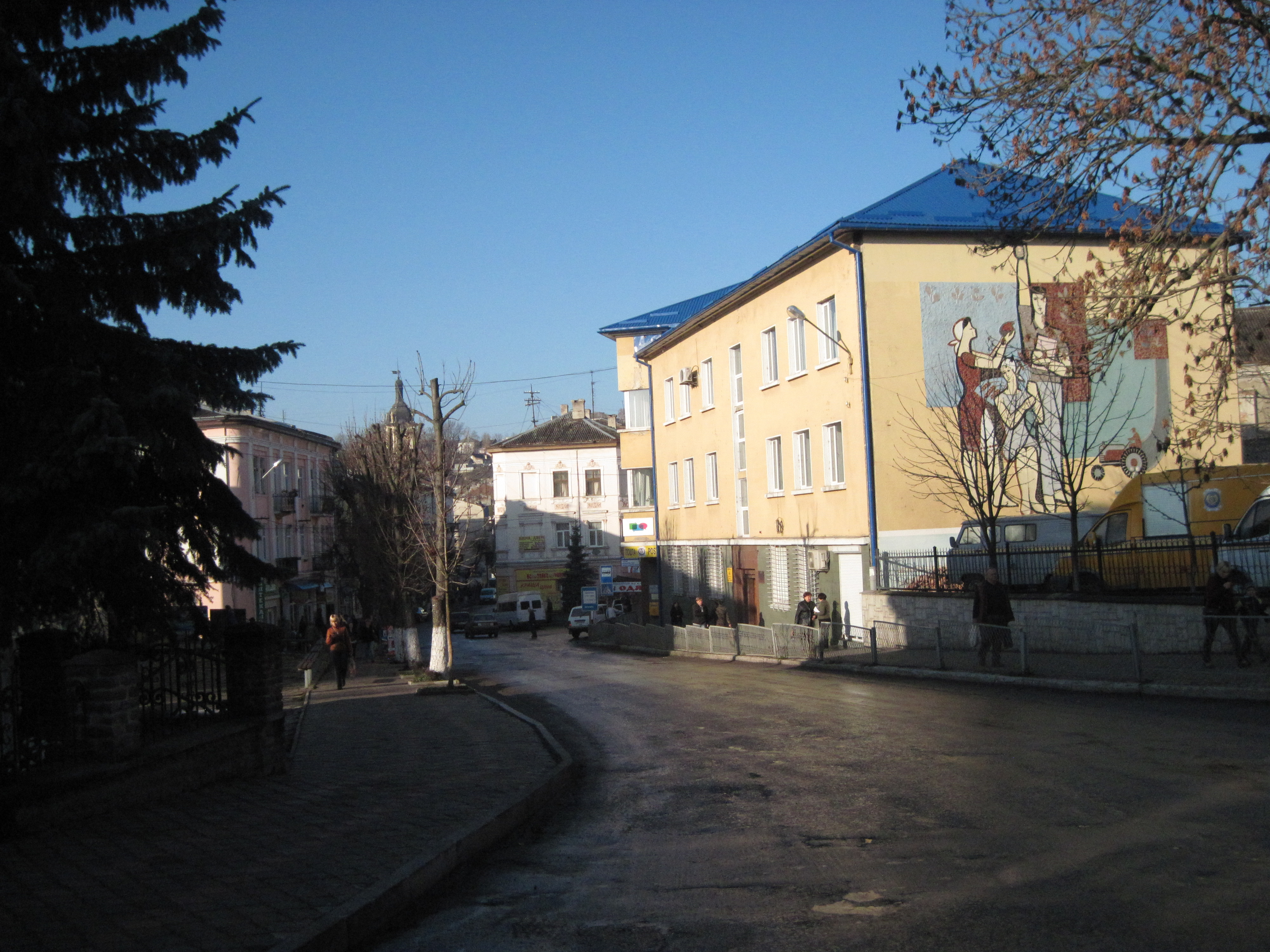 Бучач. Осінній ранок 2013